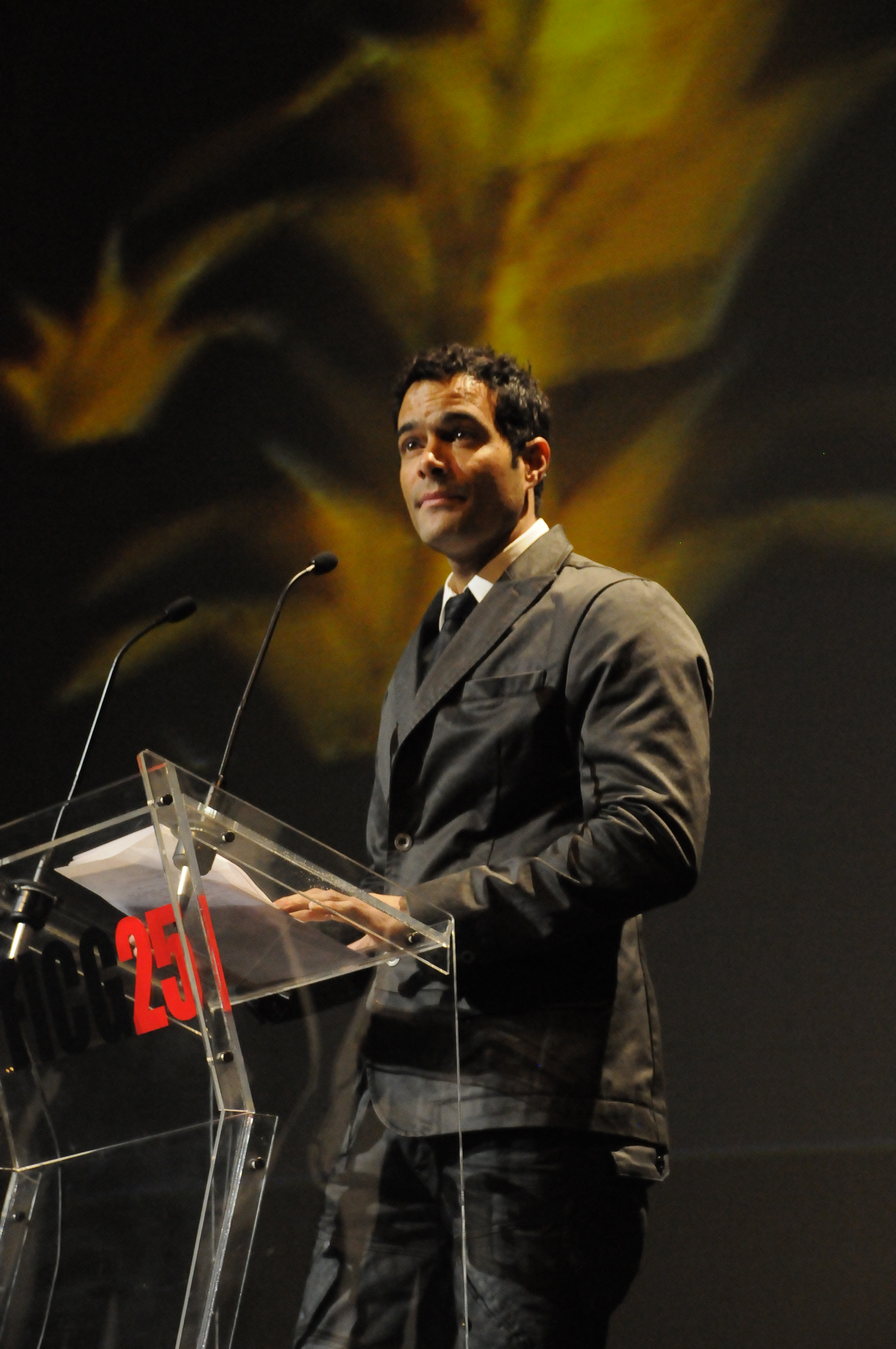 13.03.10 Gala de Homenaje Nacional. Roberto Guzmán © Cortesía de FICG 25/ Katya Calderón